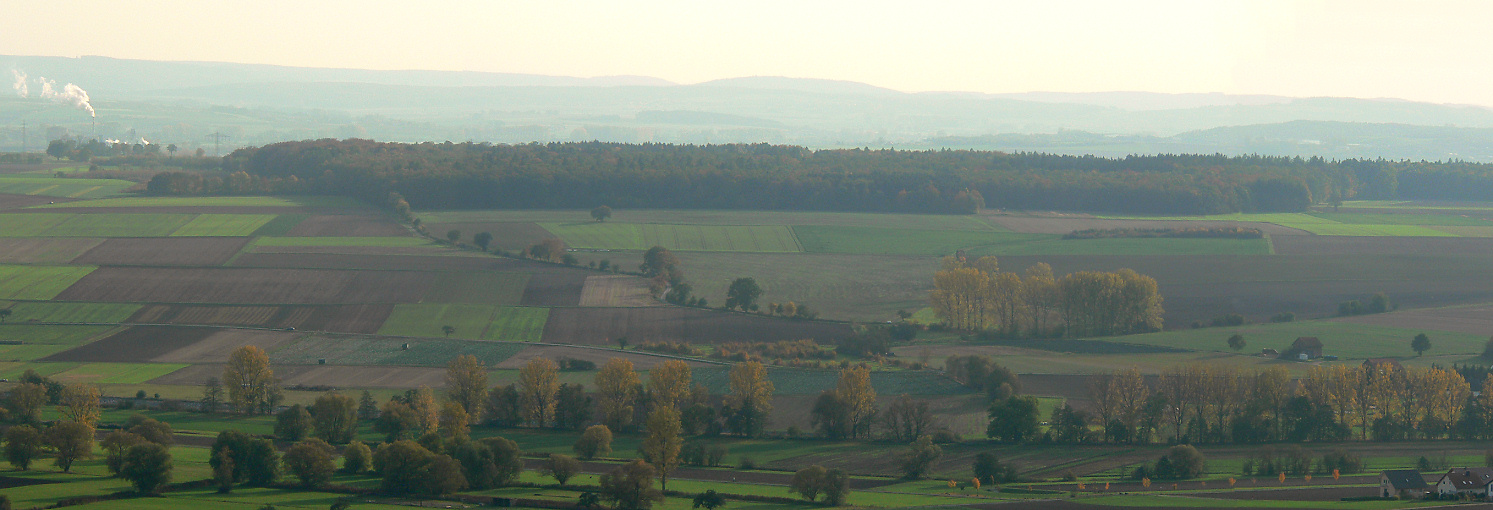 Oberstes Holz; am linken Bildrand der Schornstein der Zuckerfabrik in Wabern